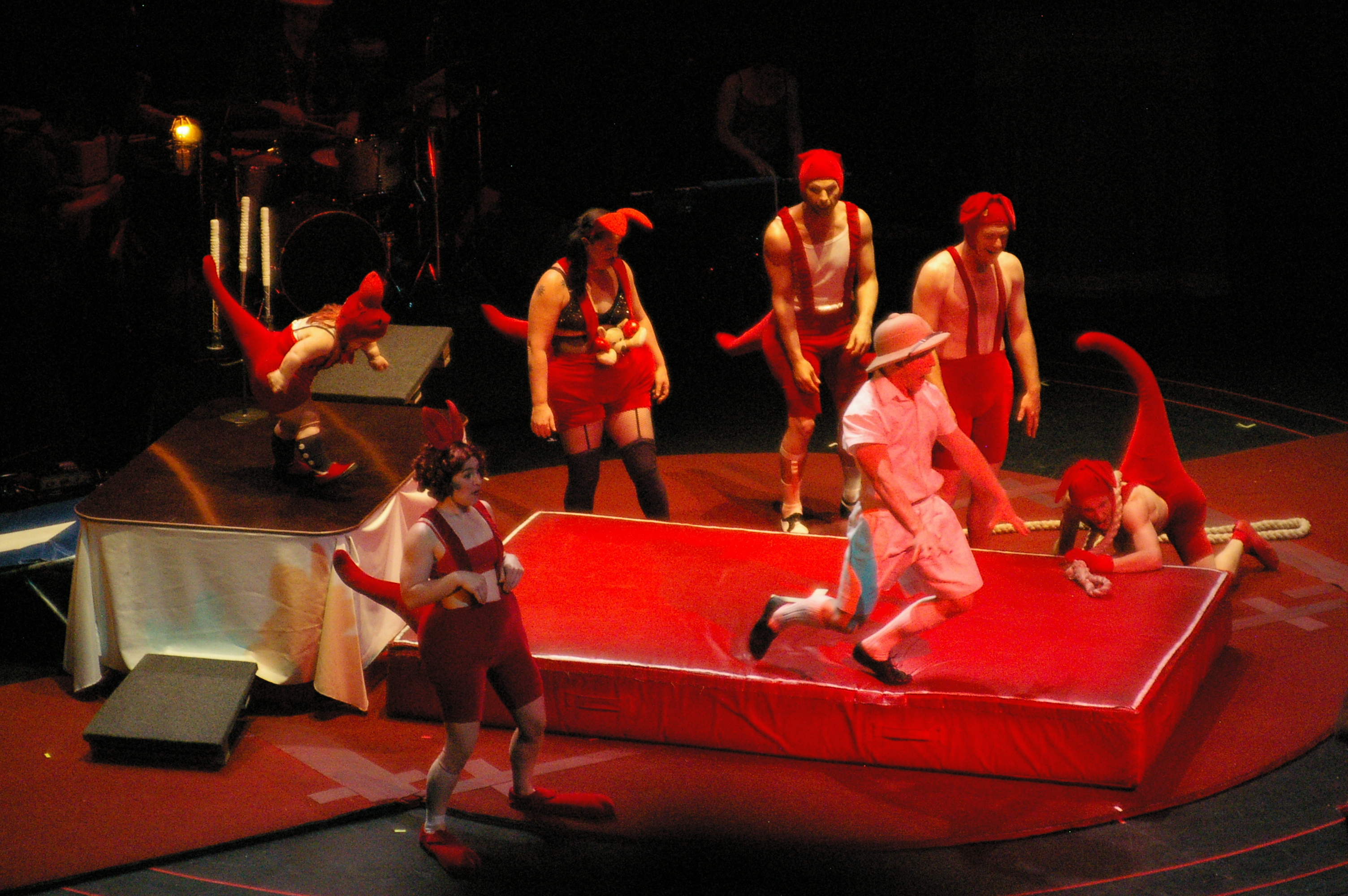 Circus Oz